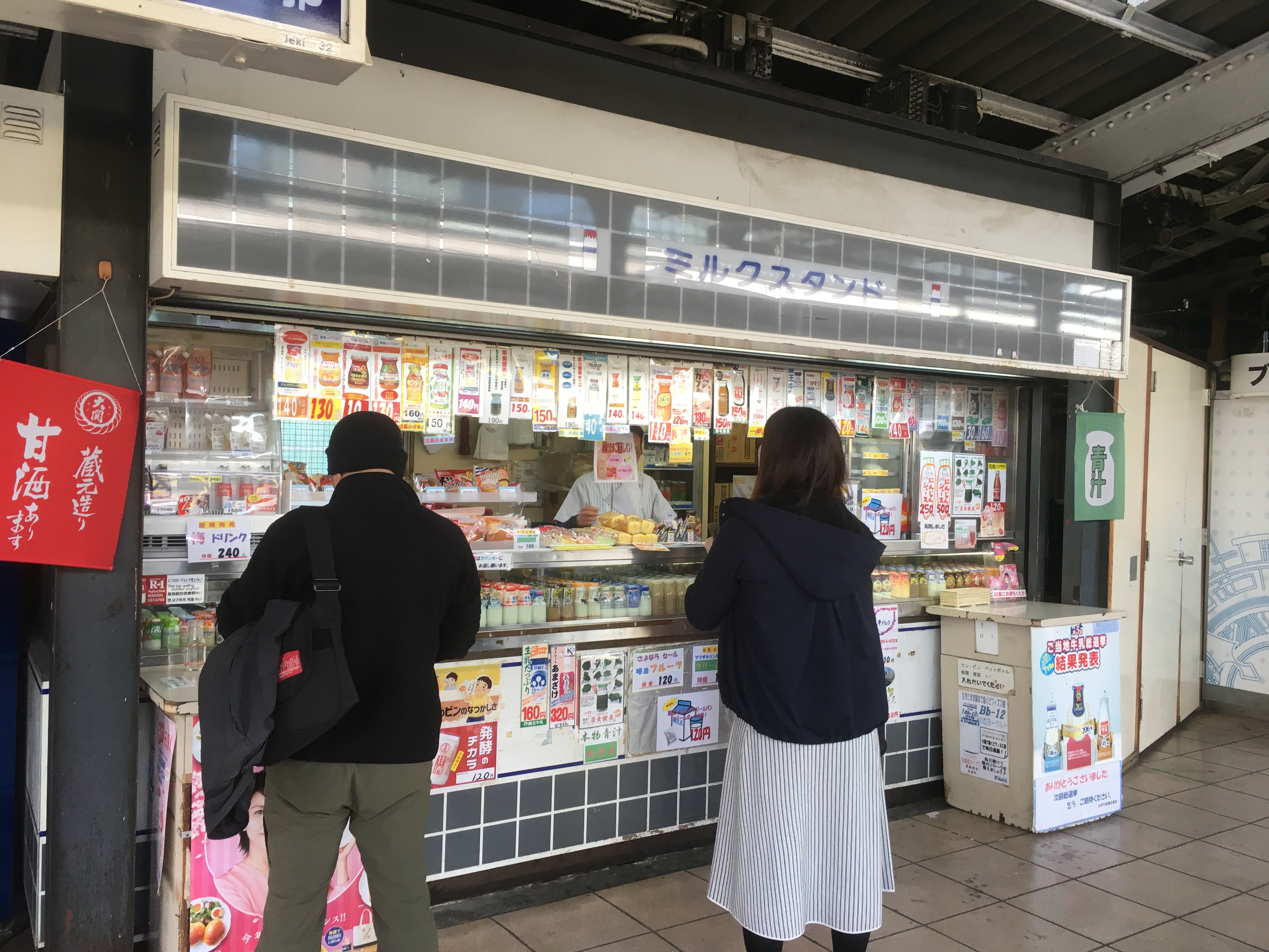 JR秋葉原駅のミルクスタンド (JR Akihabara Station “milk stand”)